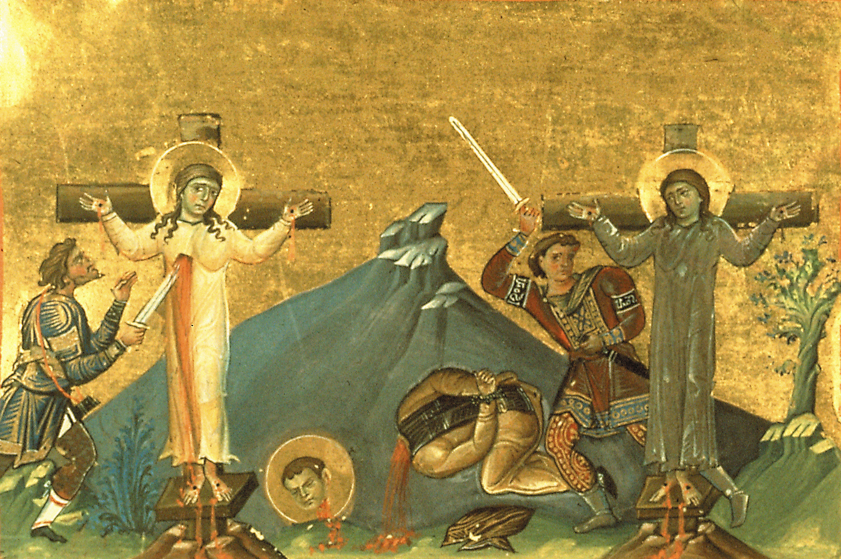 Мученики Марфа, Мария и Ликарион отрок